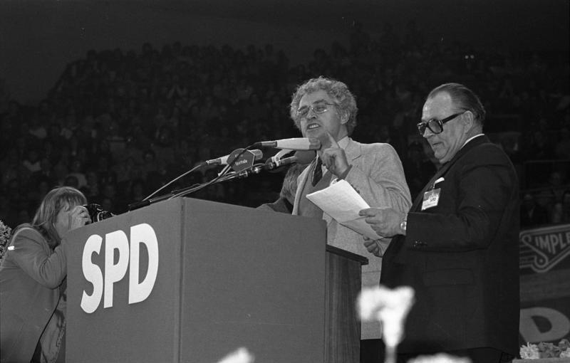 28.2.1983 SPD-Wahlkundgebung mit Kanzler-Kandidat Dr. Hans-Jochen Vogel in der Kölner Sporthalle